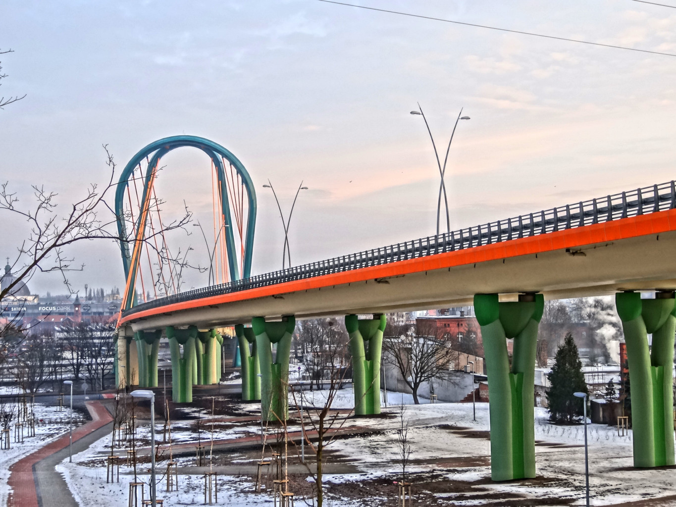 Trasa Uniwersytecka w Bydgoszczy